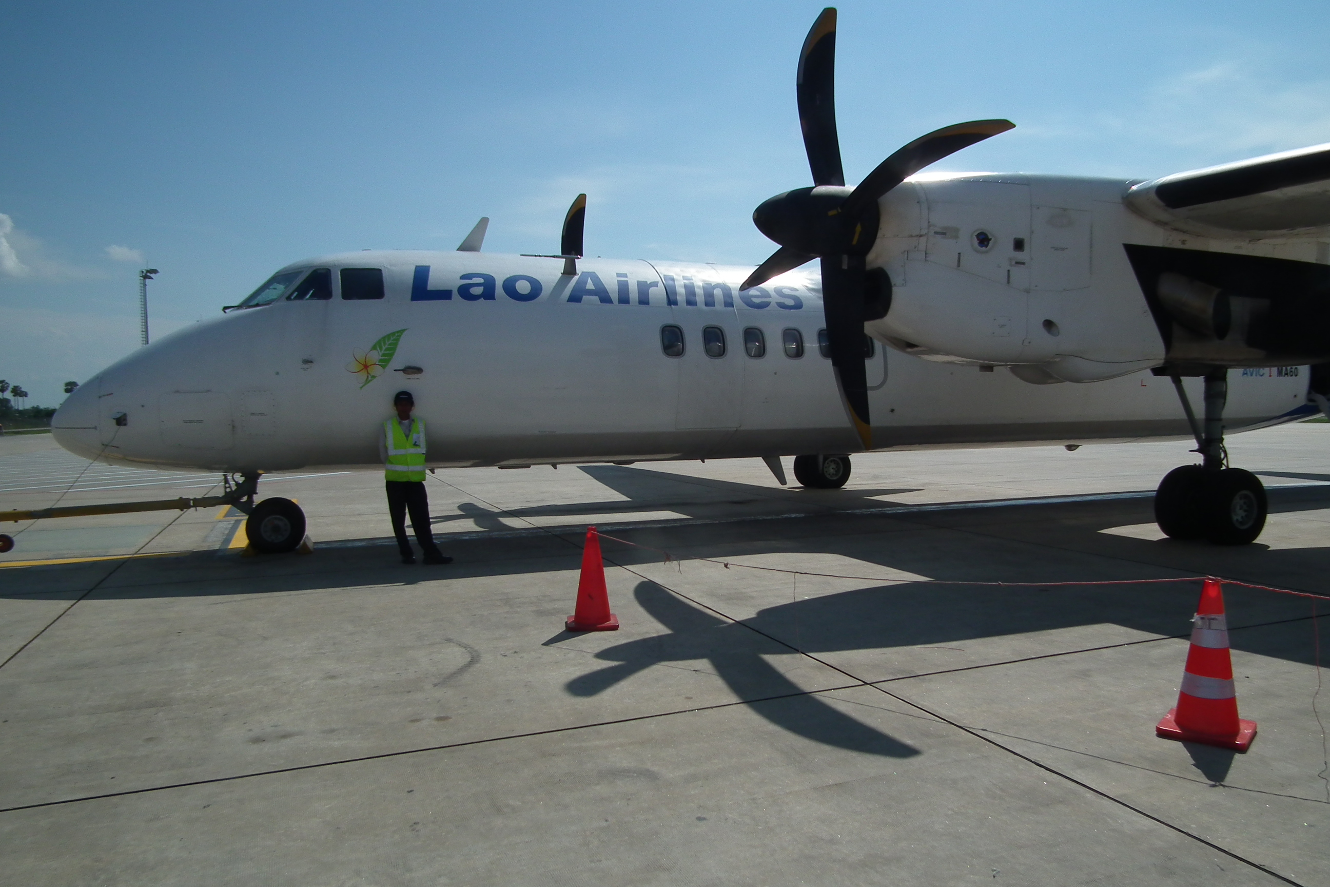 Siem Reap International Airport, Xian MA60(RDPL-34168), Lao Airlines QV523 シェムリアップ国際空港 ラオス航空 QV523